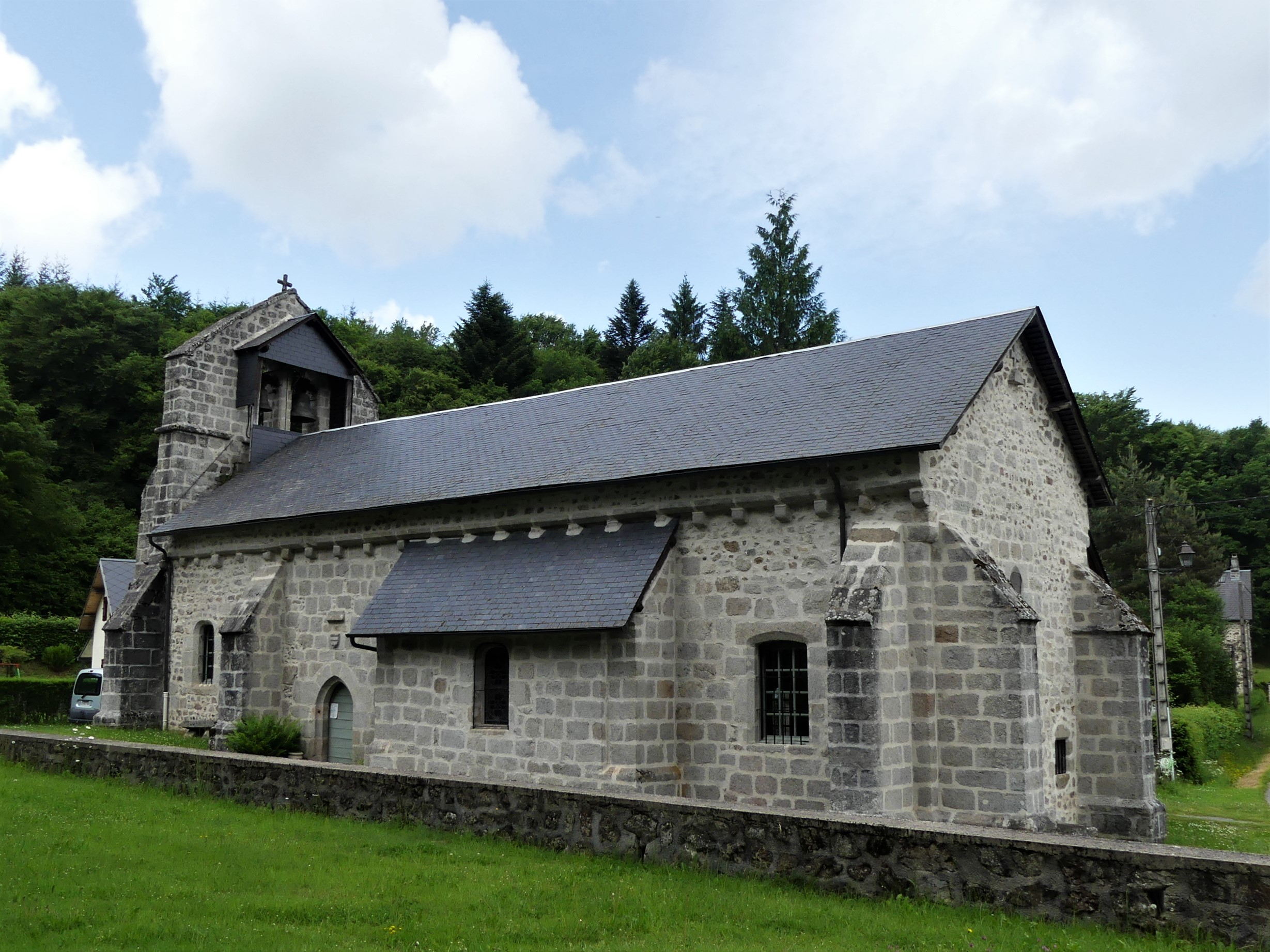 L'église de Saint-Oradoux-de-Chirouze, Creuse, France.